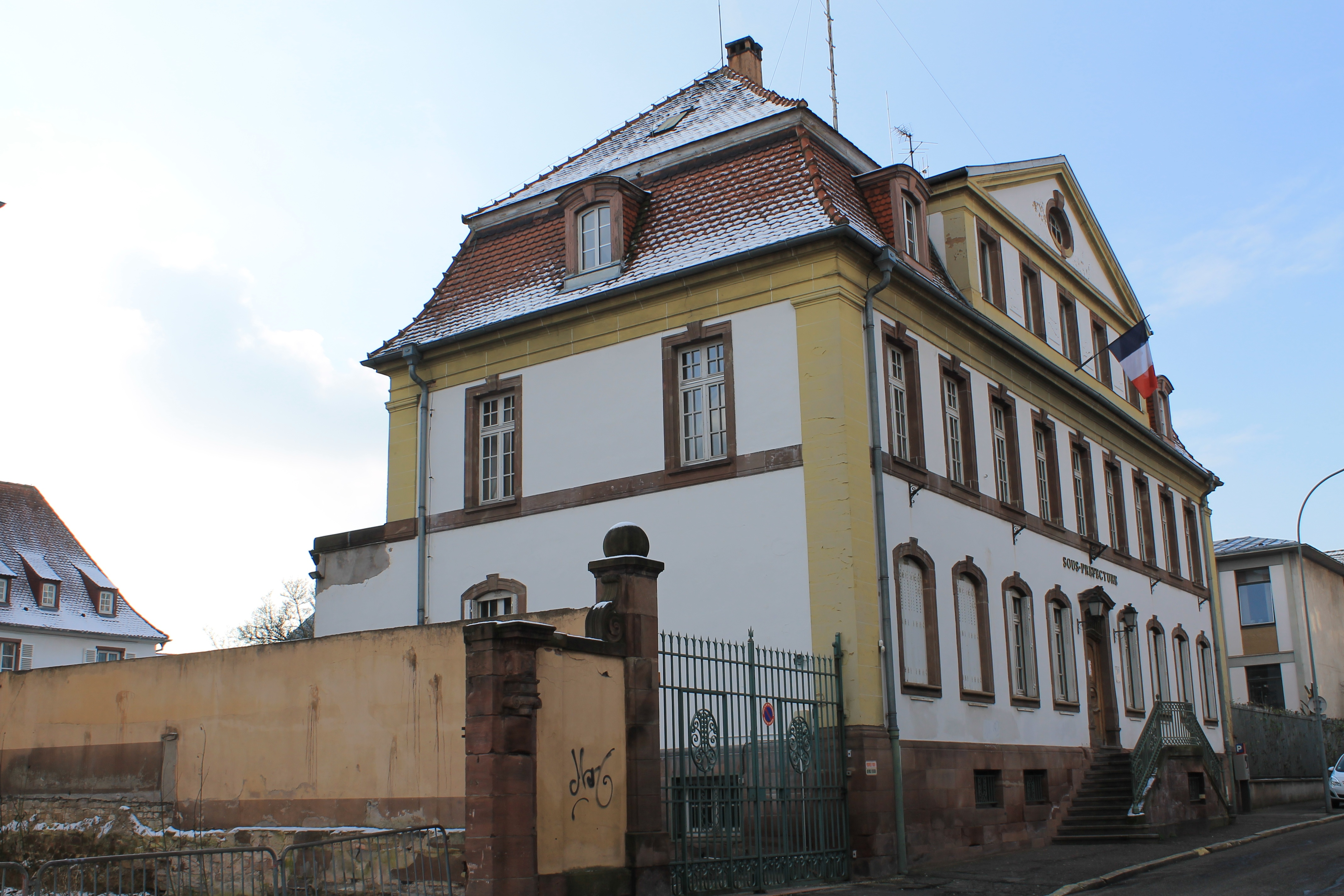 Haguenau